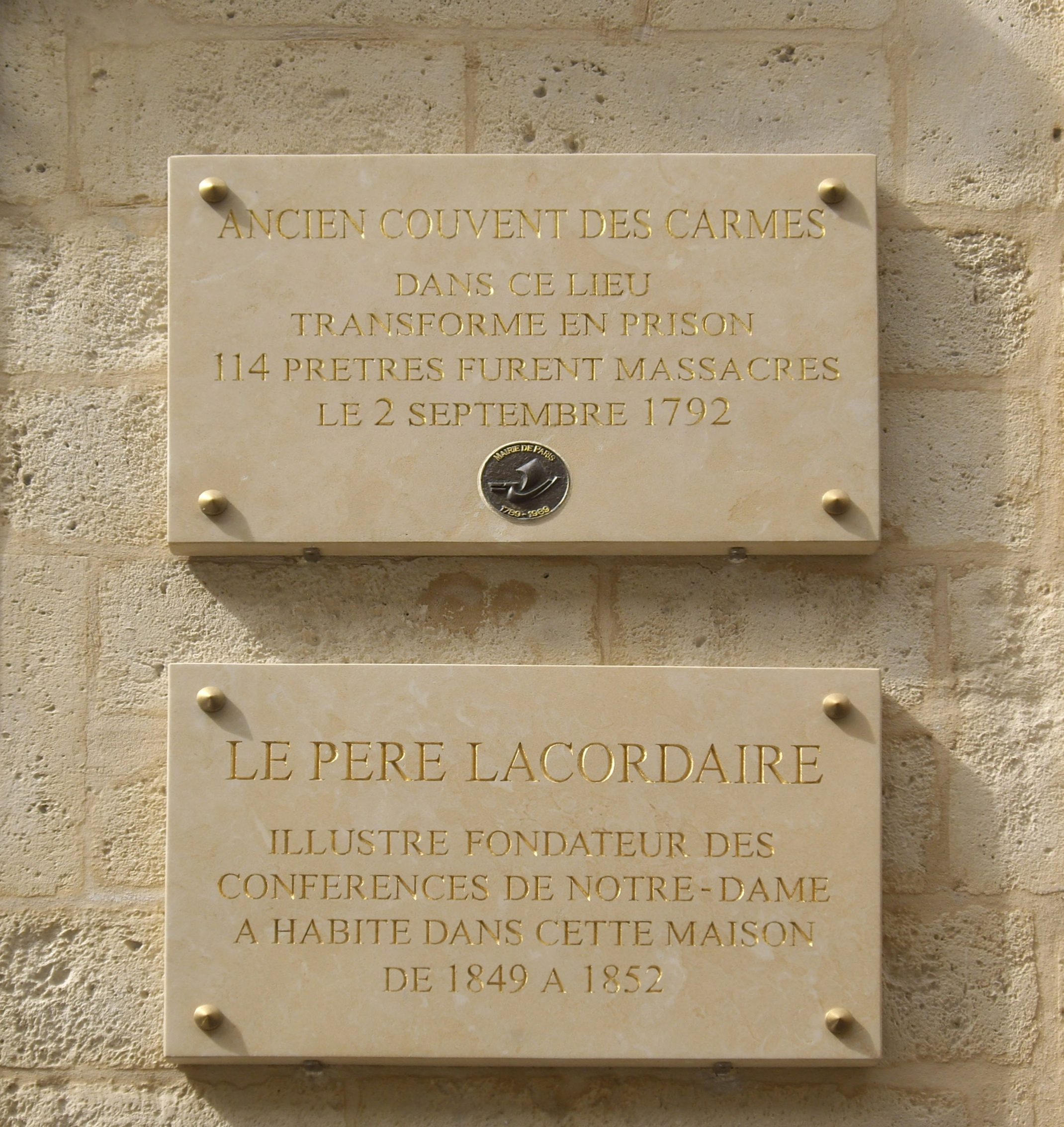 Plaques apposées au n° 70 de la rue de Vaugirard, Paris 6e.(1) Ancien couvent des Carmes. Dans ce lieu transformé en prison, 114 prêtres furent massacrés le 2 septembre 1792.(2) Le père Lacordaire, illustre fondateur des Conférences de Notre-Dame, a habité dans cette maison de 1849 à 1852.